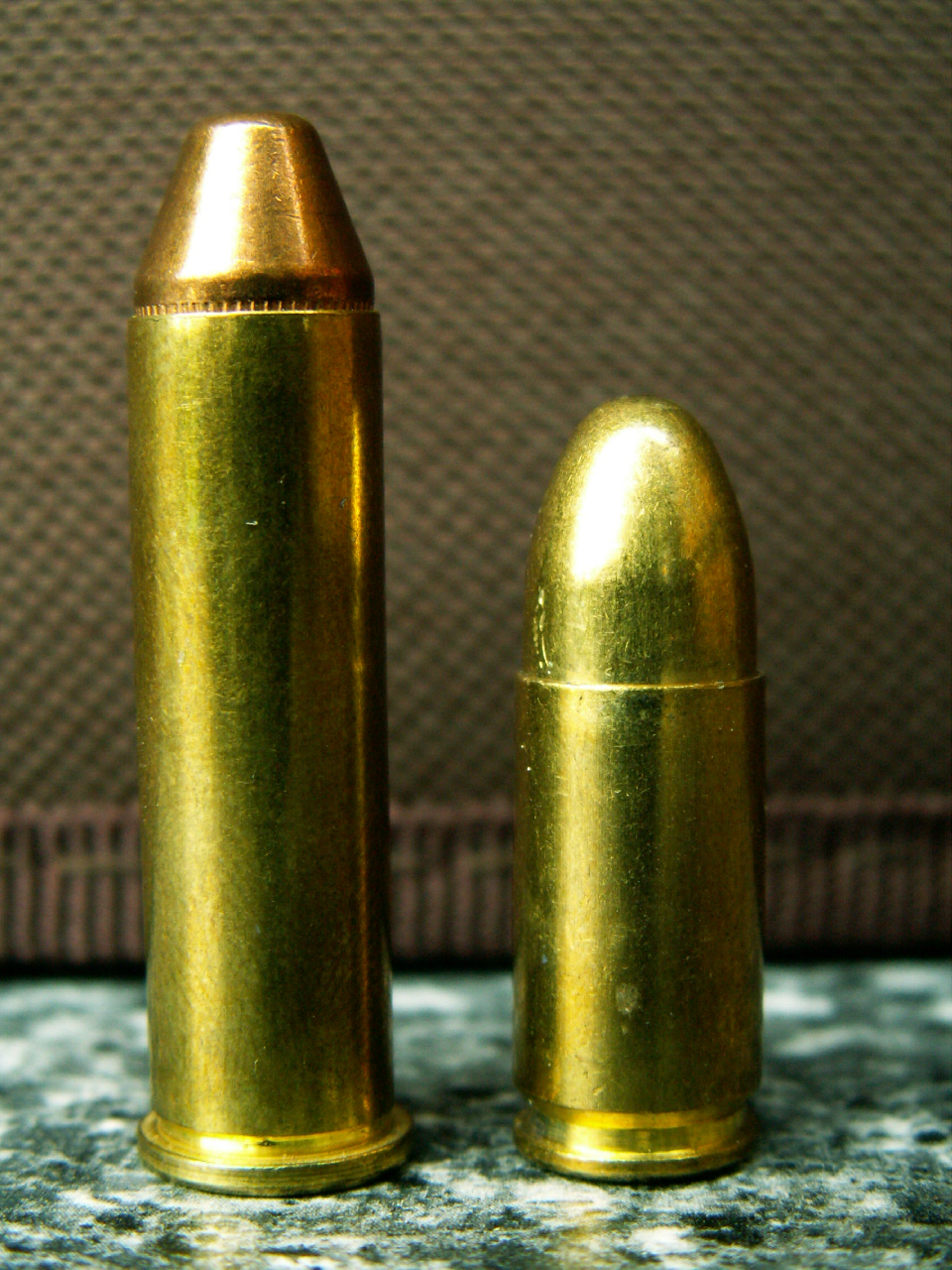 Primerjava nabojev .357 Magnum in 9 x 19 mm.